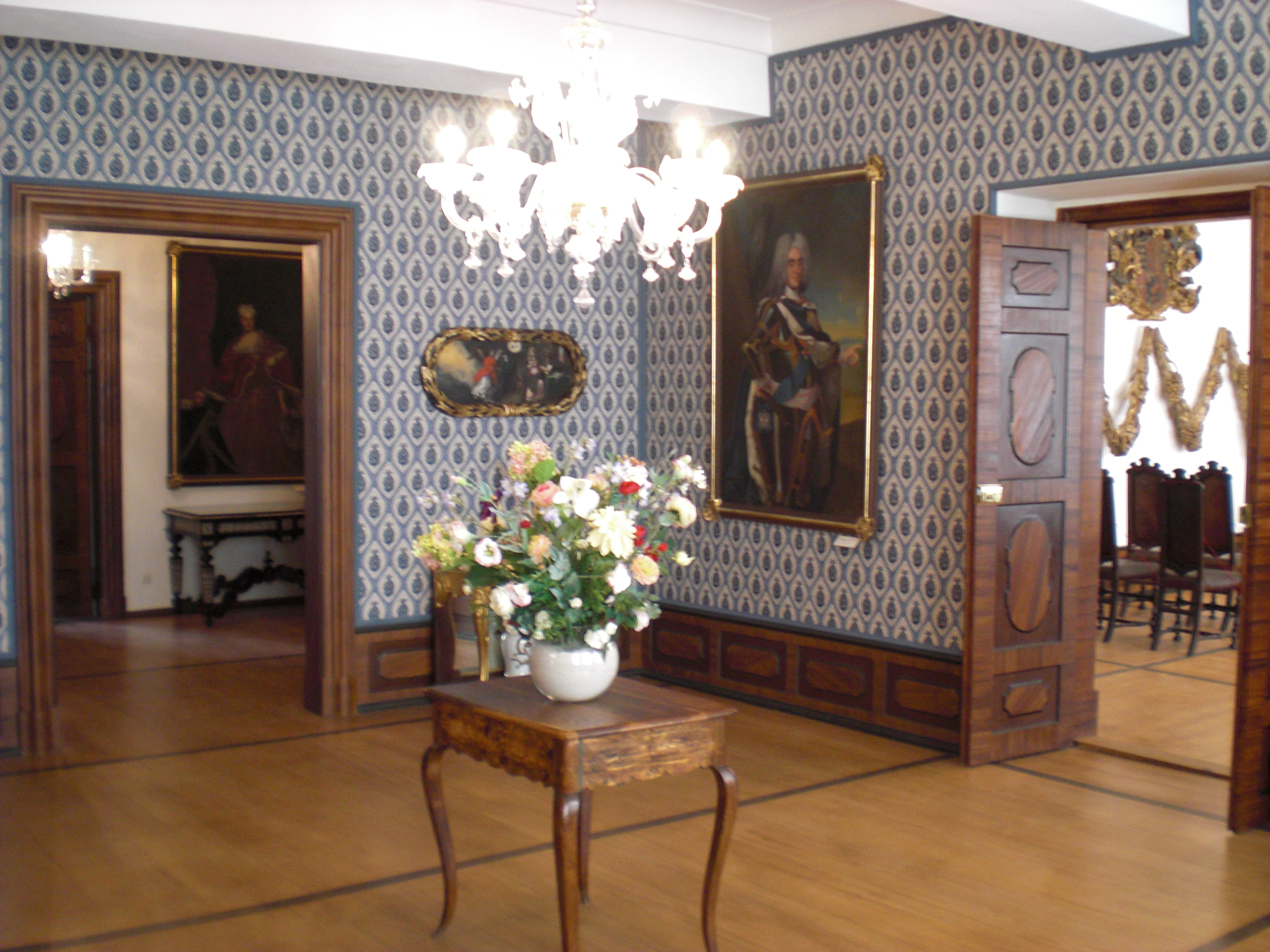 Vorgemach im Schloss Delitzsch